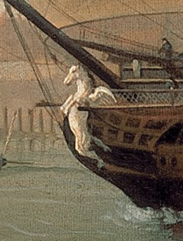 Figure de proue du vaisseau de 74 canons le Pégase en 1782. (Détail d'un tableau anglais).